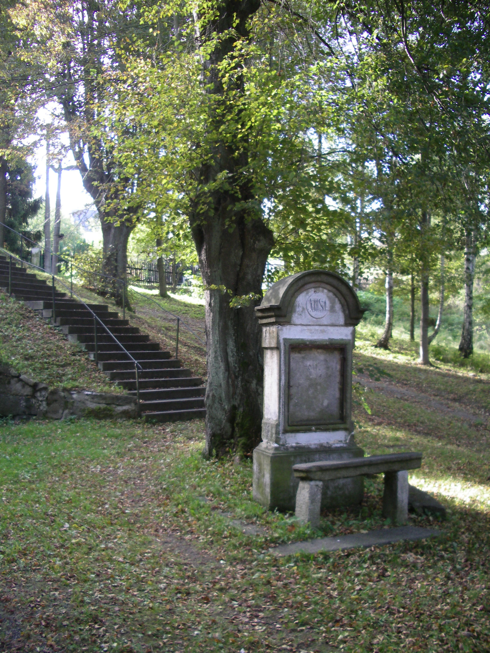 Kreuzweg um die Wallfahrtskirche von Vilémov u Šluknova (Wölmsdorf). Station 13.